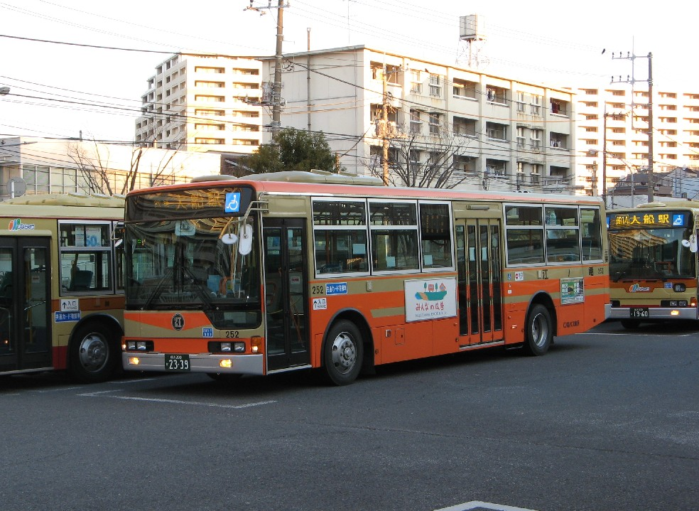 江ノ電バス横浜252号車。長尺4枚折戸。横浜市栄区大船駅東口バスターミナルにて撮影。